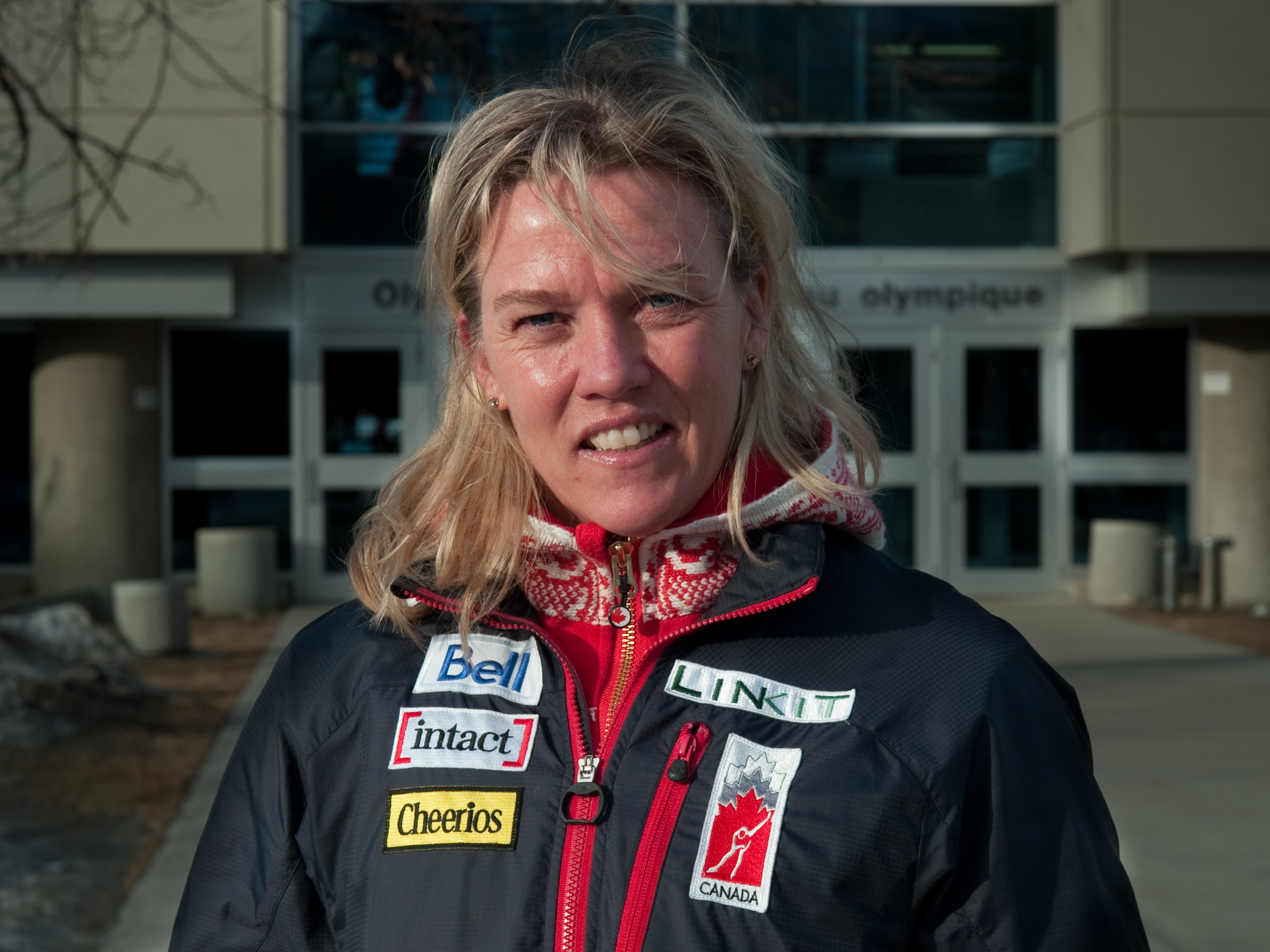 Dirkina Wilhelmina (Ingrid) Paul (Gouda, 14 december 1964) is een schaatscoach en voormalig Nederlands schaatsster. -- Ingrid Paul, bondscoach van de Canadese schaatsploeg.